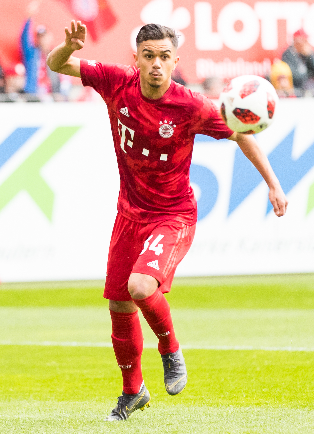 during 1.FC Kaiserslautern vs FC Bayern München at Fritz-Walter-Stadion, Kaiserslautern, Rheinland-Pfalz, Germany on 2019-05-27, Photo: Sven Mandel